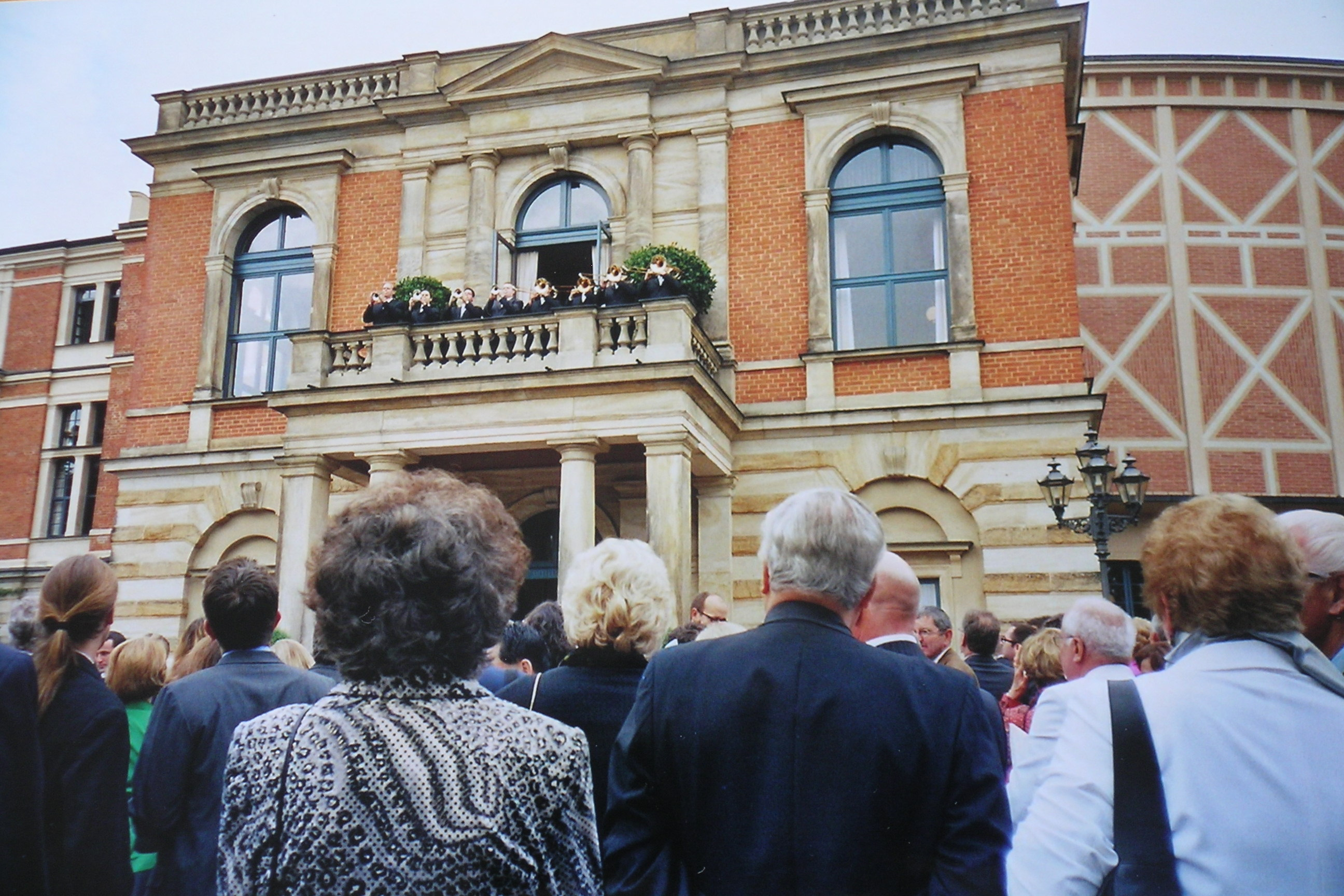 Festspielhaus Bayreuth Pausenende